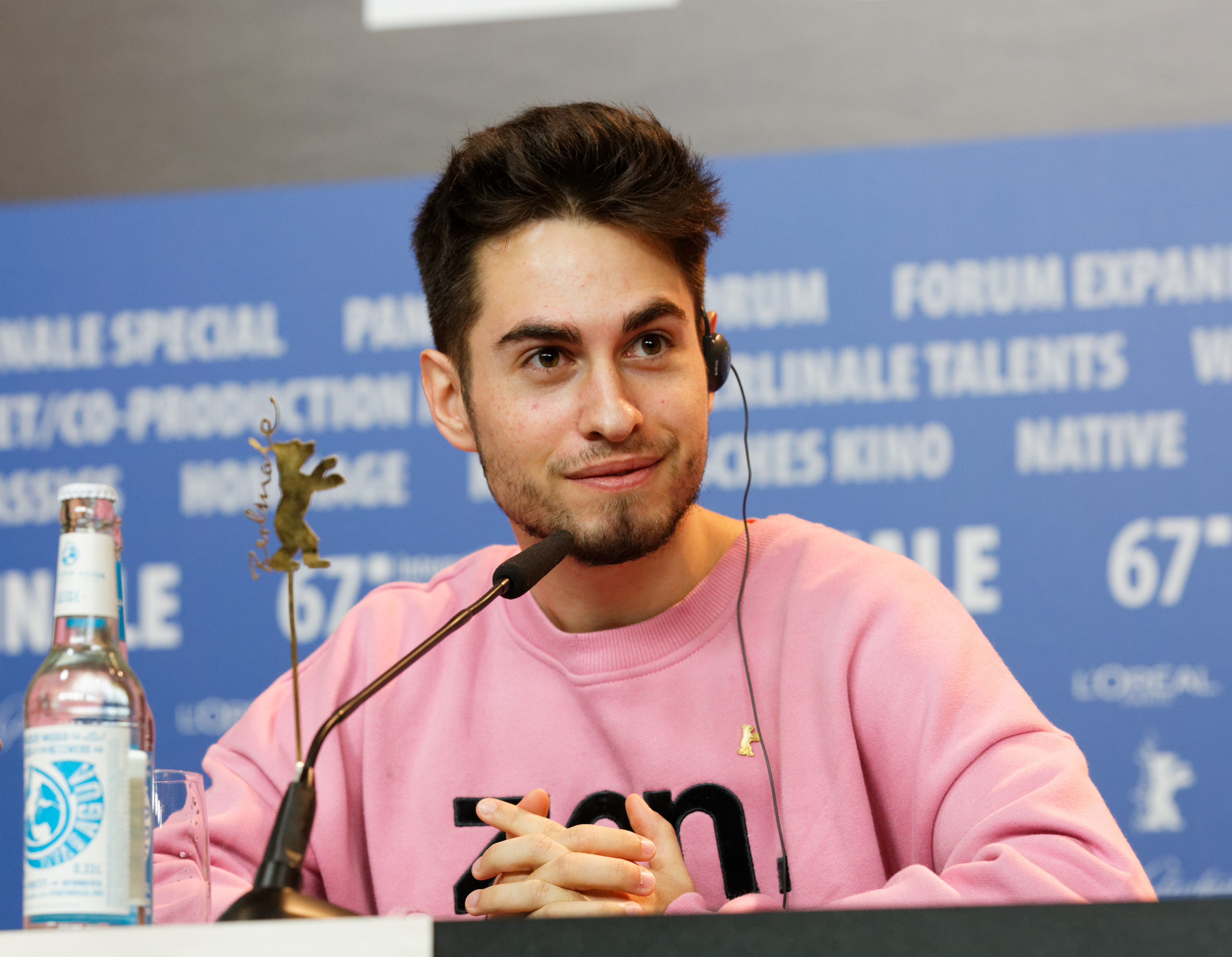 Eloi Costa in der Pressekonferenz zu Skin bei der Berlinale 2017